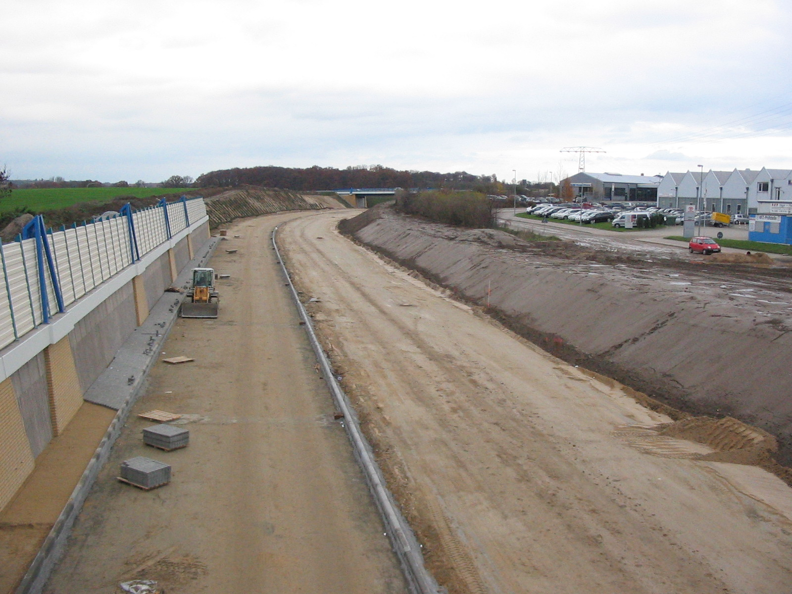 Zweiter Bauabschnitt der Umgehungsstraße Schwerin, Fertigstellung ca. Ende 2007, zukünftig Teil der Bundesstraße 106, Höhe Schwerin-Warnitz, Richtung Nord